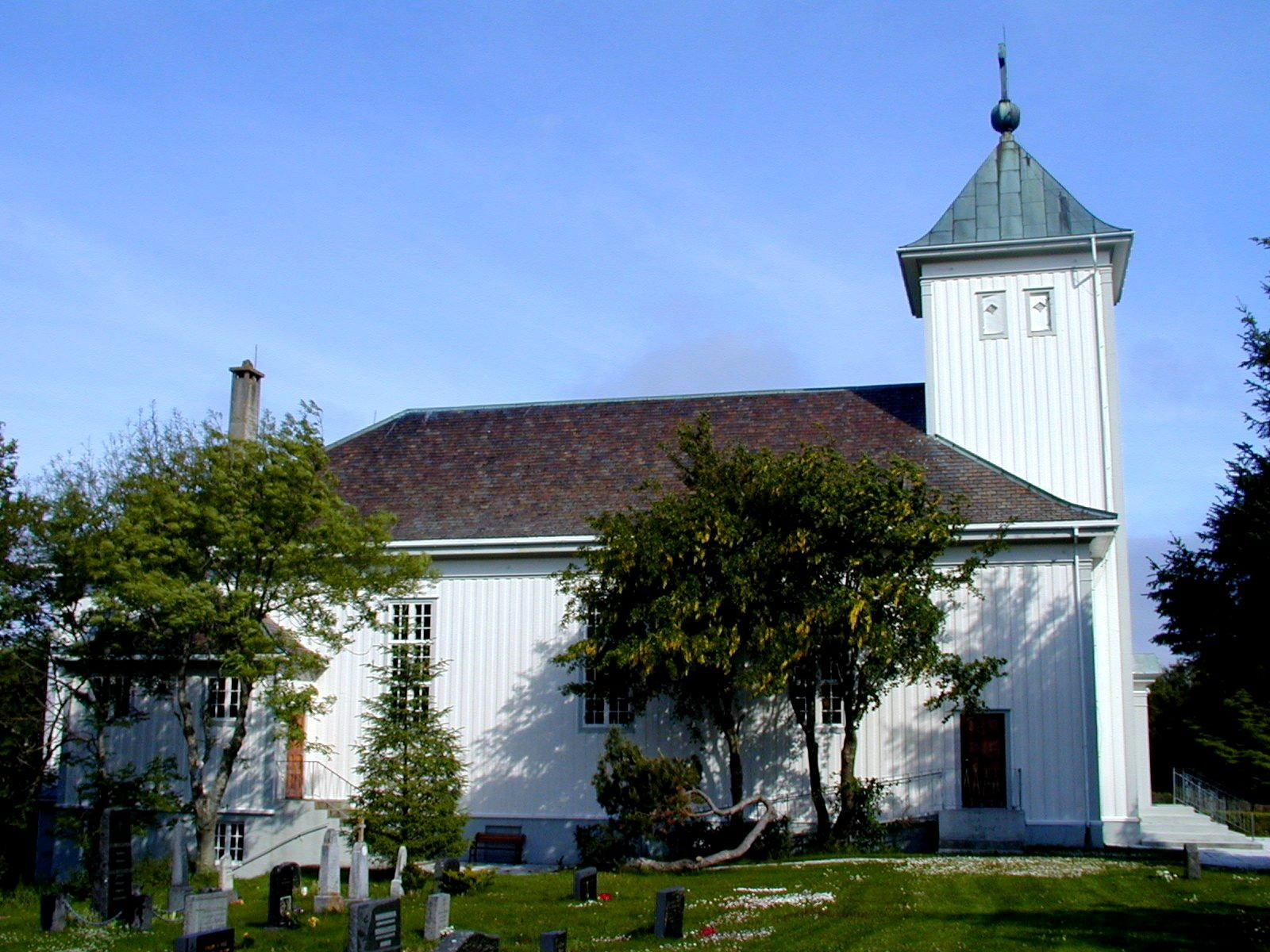 Harøy kirke. Foto: Max Ingar Mørk. Fra Riksantikvarens Kulturminnesøk.